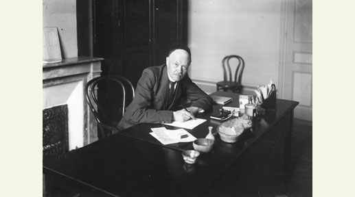 Charles Nicolle (1866-1936)dans son bureau, à l’Institut Pasteur de Tunis, vers 1910